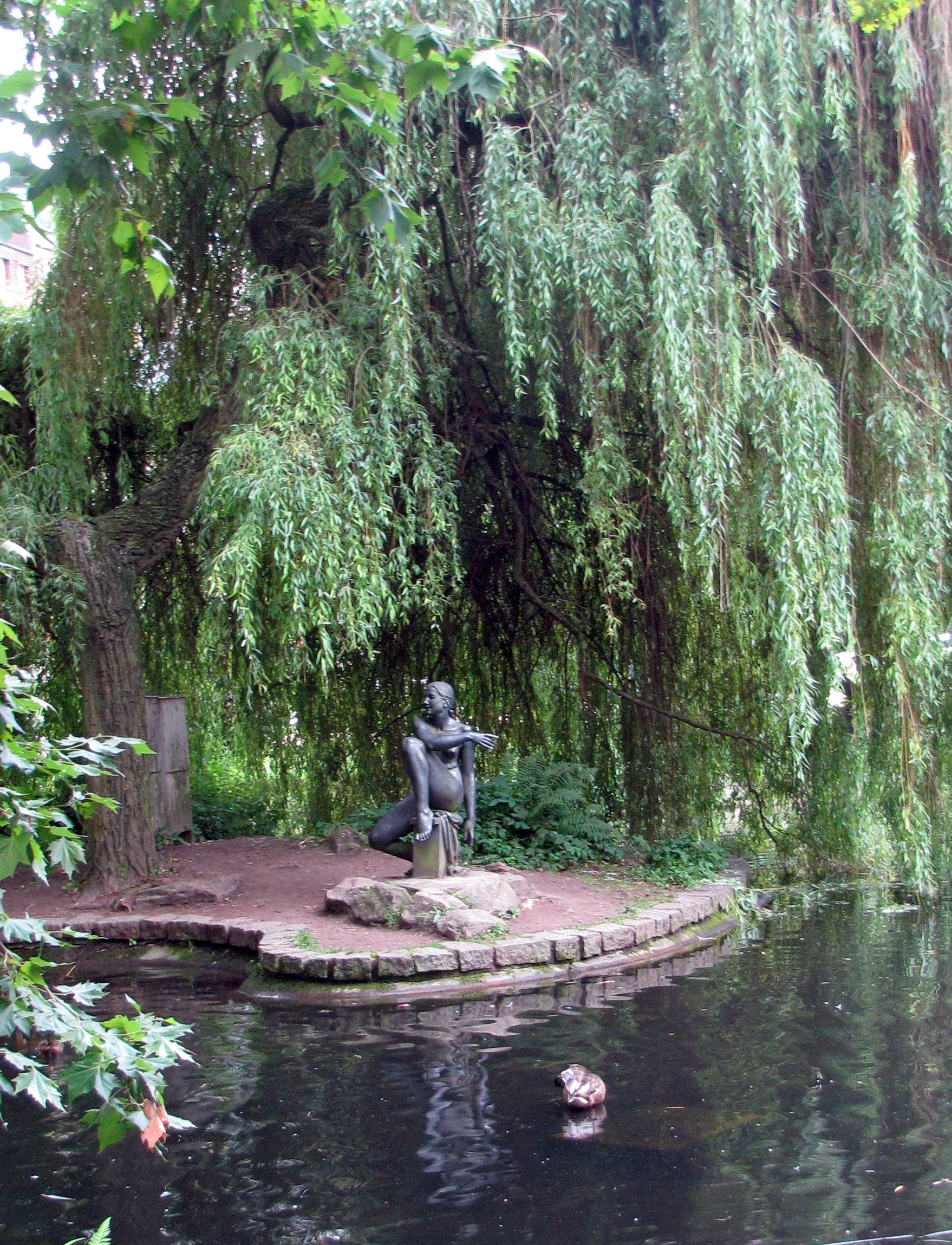 Карловы Вары. Городская скульптура.